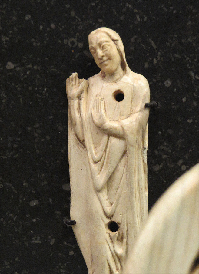 Mariafigur i hvalrostand, ca. 1200-1250, fundet ved St. Clara Kloster i Roskilde, Nationalmuséet i København